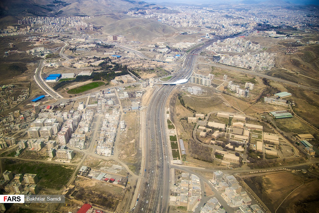 تصویرهوایی از شهر سنندج